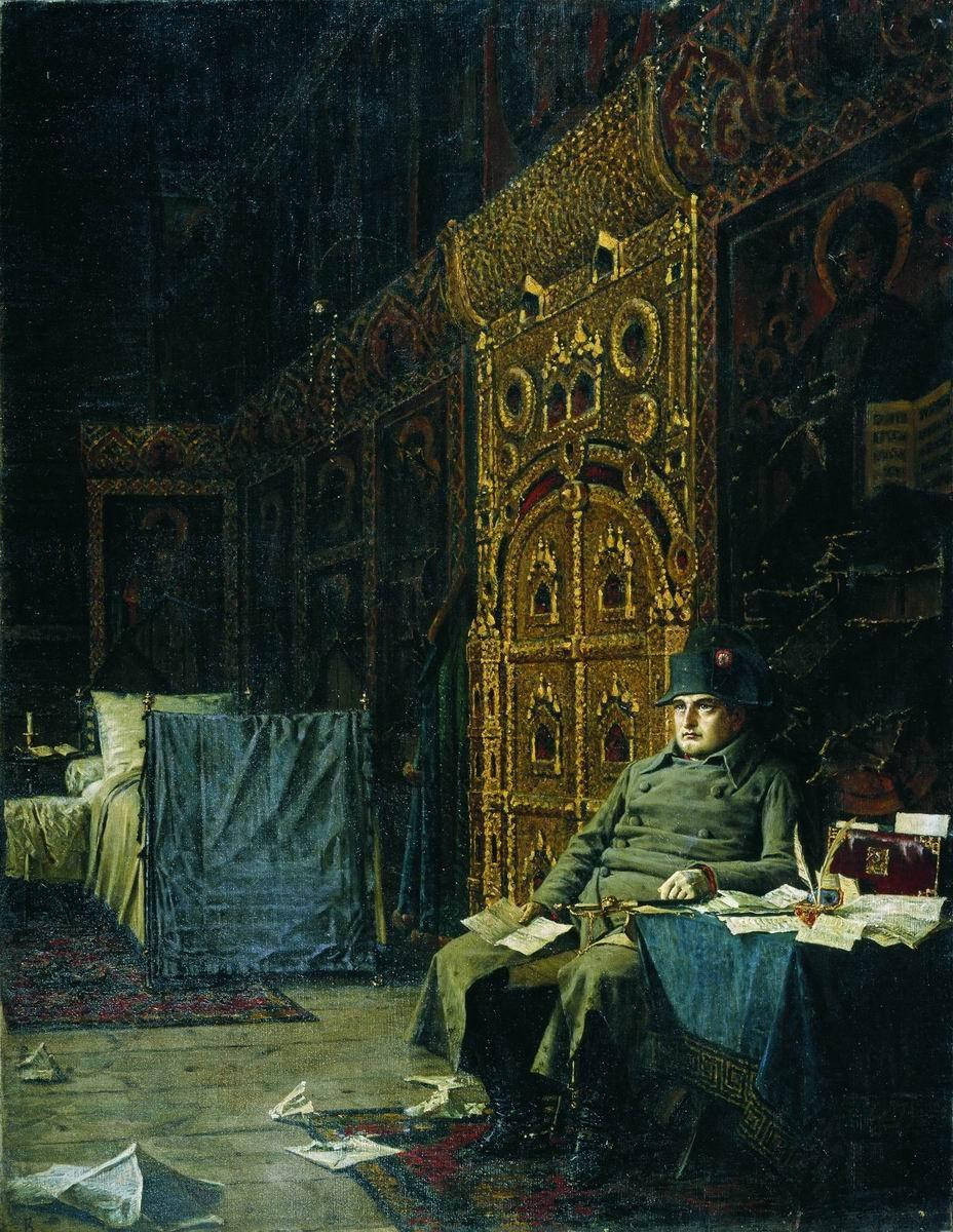 На этапе. Дурные вести из Франции